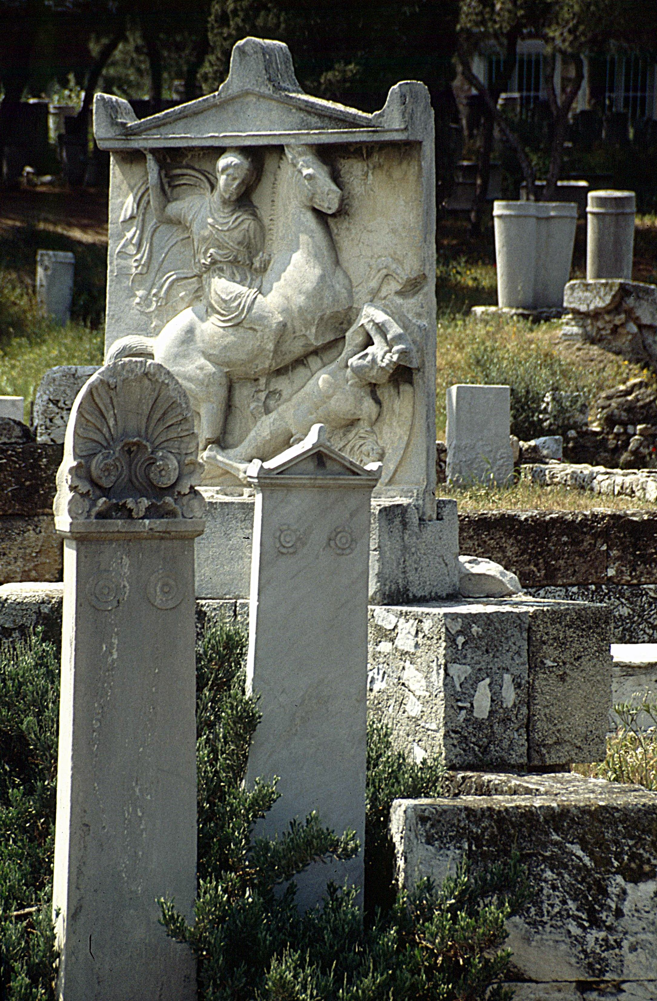 Kerameikos: antiker Friedhof